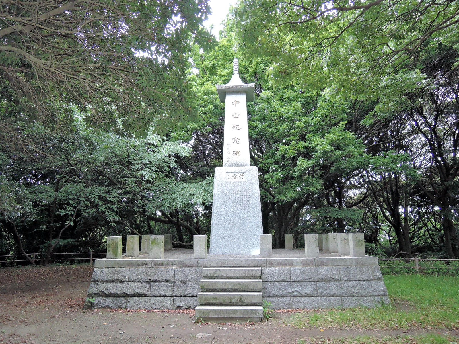 福岡市南公園